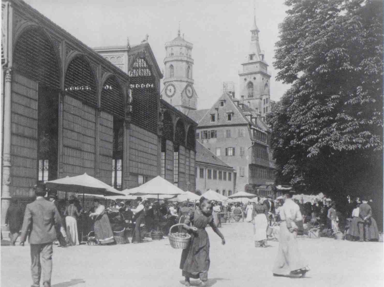 Stuttgart, vorn links: Alte Markthalle oder Gemüsehalle, dahinter: Alter Marstall, Gasthof „Zum König von England“ und Stiftskirche, vor 1911.